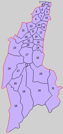 富山県婦負郡の町村。